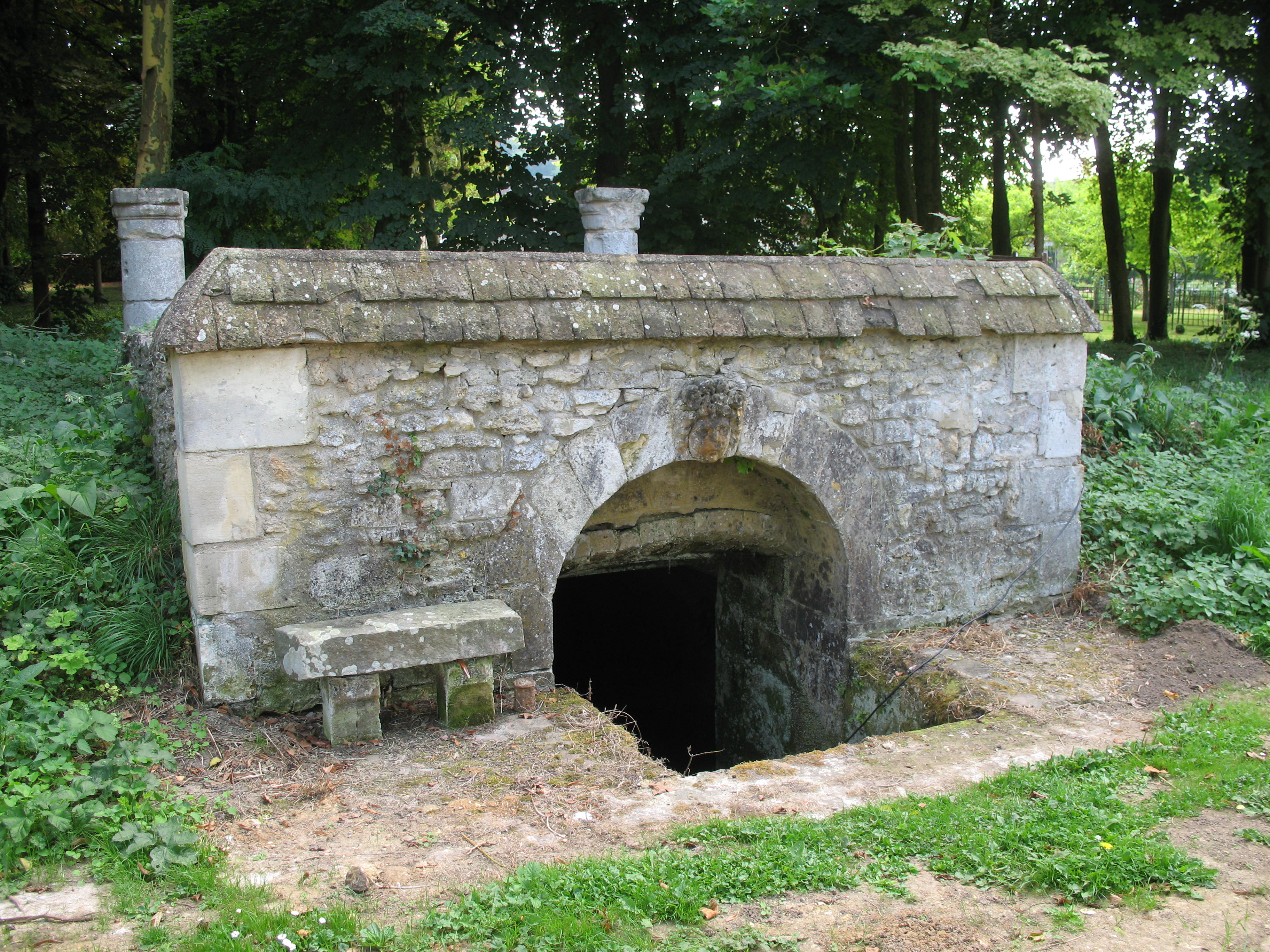 Château de Boury à Boury-en-Vexin dans l'Oise - La glacière